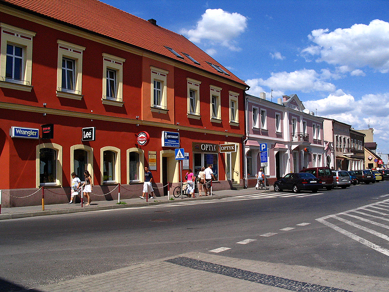 ulica Kolejowa w Gostyniu.